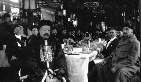 1908年陕甘总督升允在兰州宴请芬兰人曼内海姆和修建黄河铁桥的外国工程技术人员